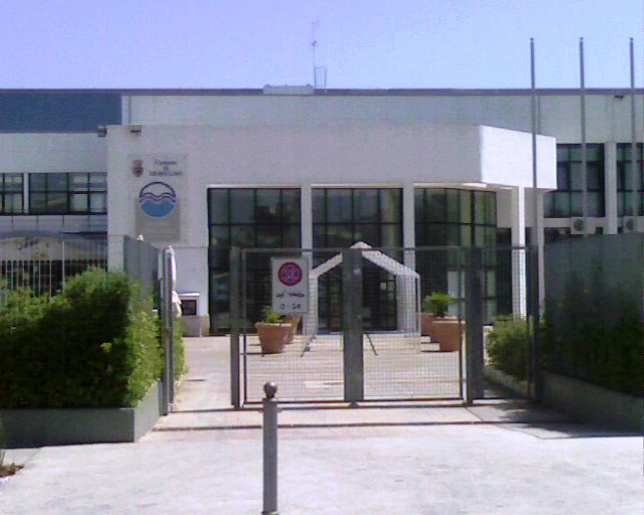 Piscine comunali - Modugno (bari)-Italy